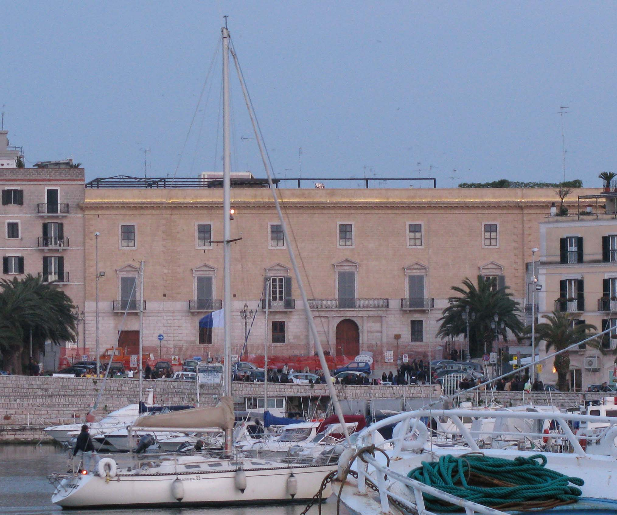 Vista Porto di Palazzo Telesio